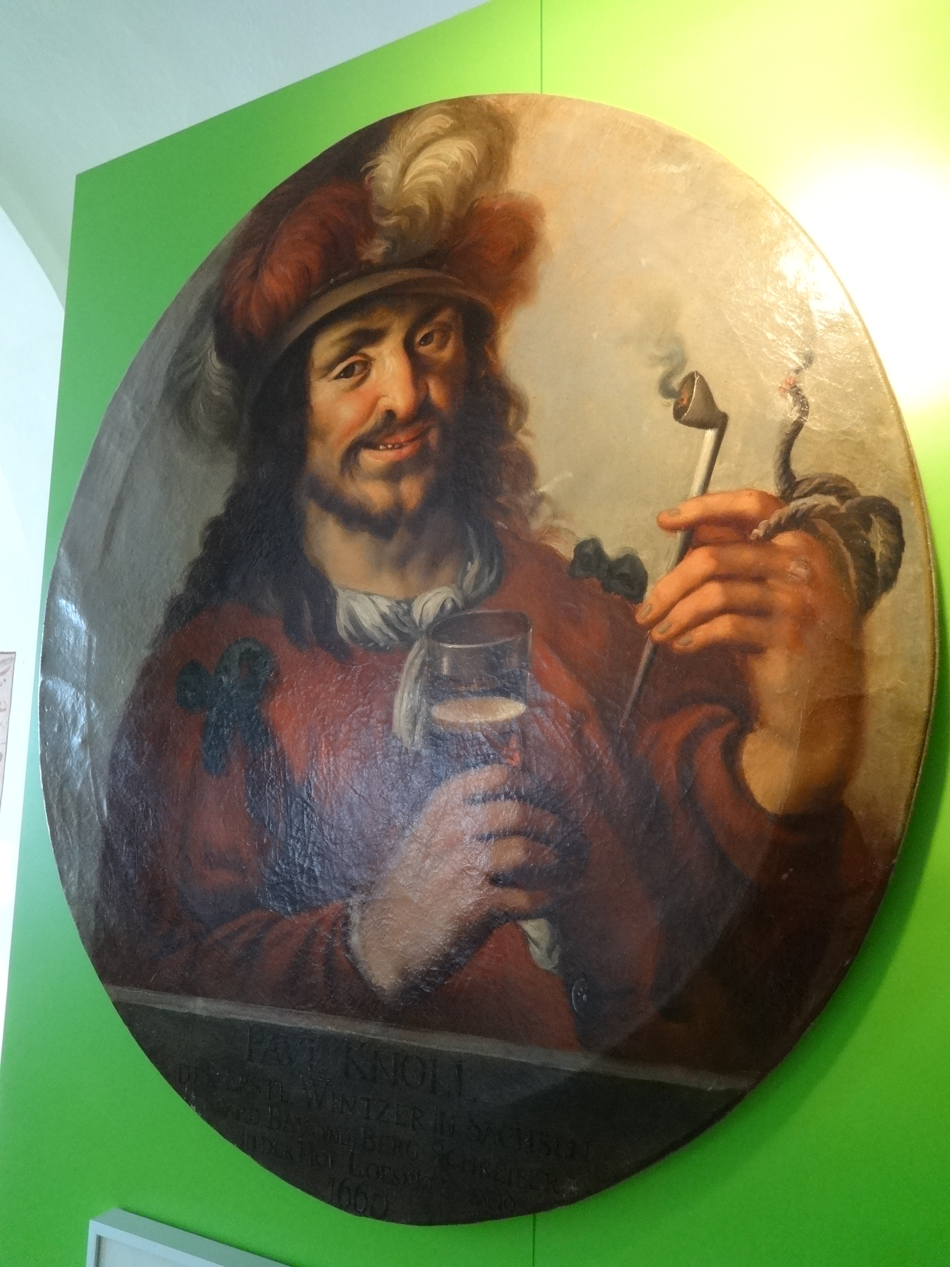 Gemälde von C. Focke: Johann Paul Knohll; 1797; Gemäldesammlung des Sächsischen Weinbaumuseums Hoflößnitz